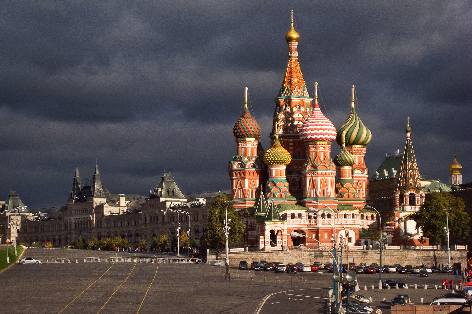 Собор Василия Блаженного; Собор Покрова, что на Рву; Покровский собор, Москва